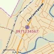 Пример работы LBS-услуги «Мобильная карта» компании «Киевстар» - фрагмент карты с указанным местоположением абонента. Изображение посыдается абоненту с помощью MMS.